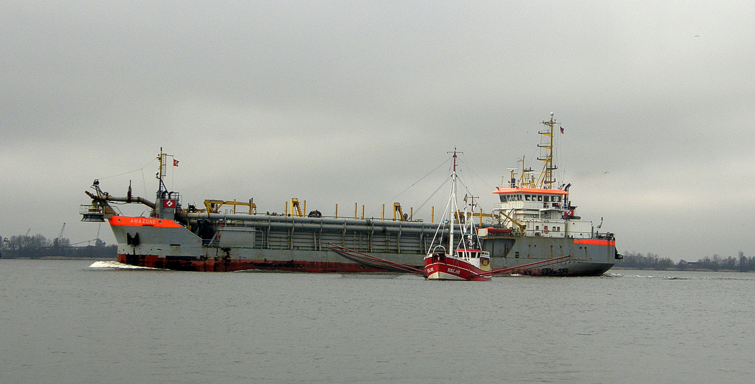 Bilder aus Hamburg